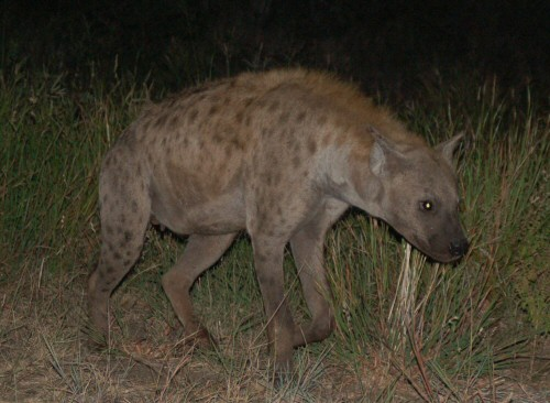 Spotted Hyena in the Kruger Park, South Africa